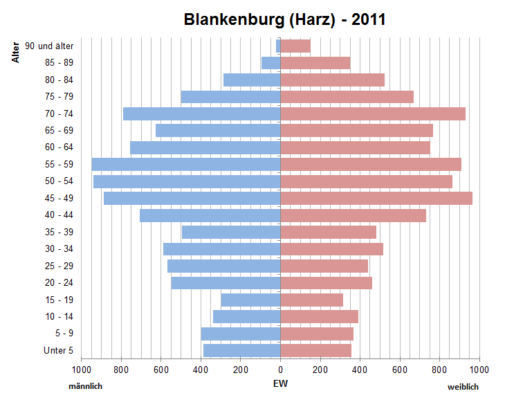 Bevölkerungspyramide der Stadt Blankenburg (Harz) nach Zensus 2011.